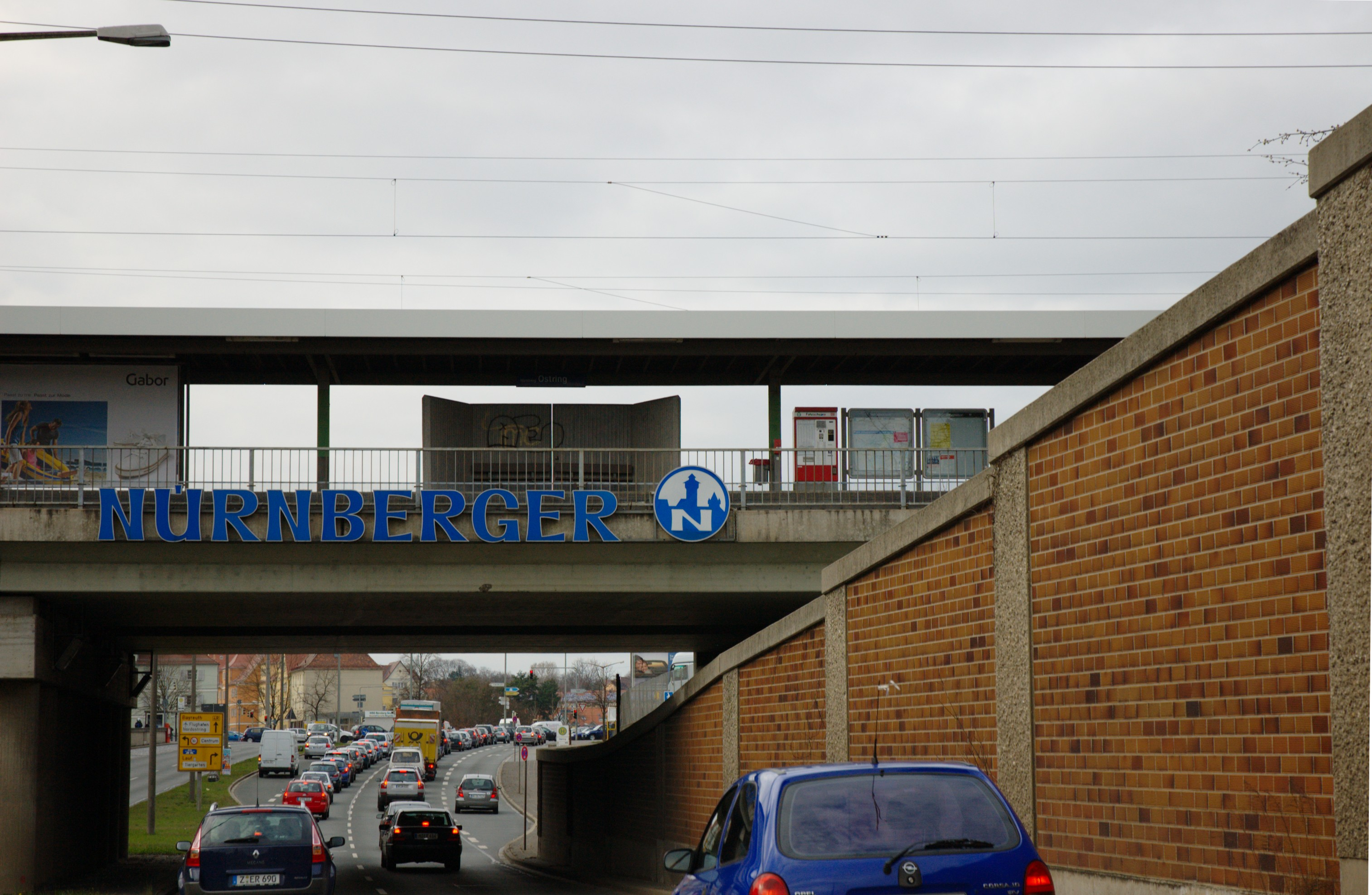 Nürnberg